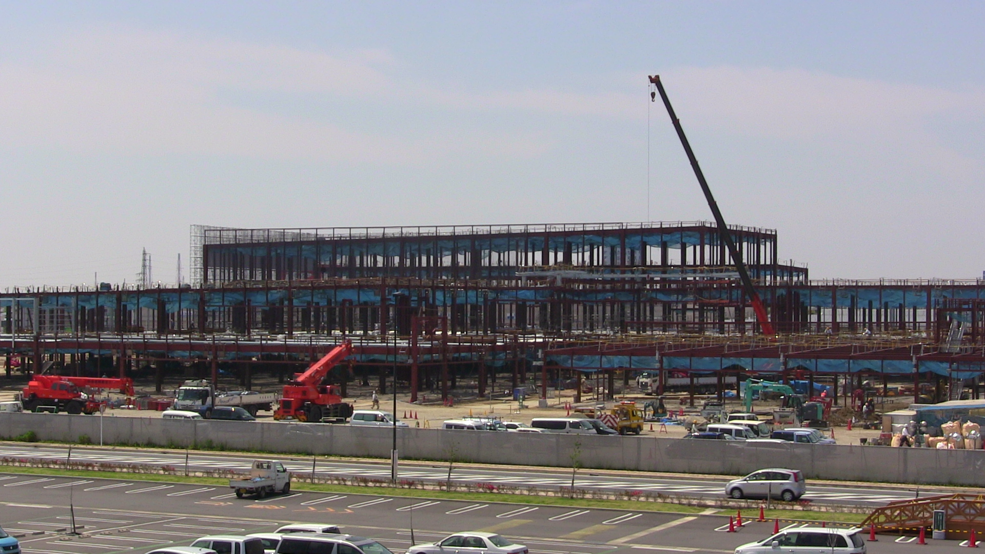 2013年5月18日現在のアリオ市原,工事状況